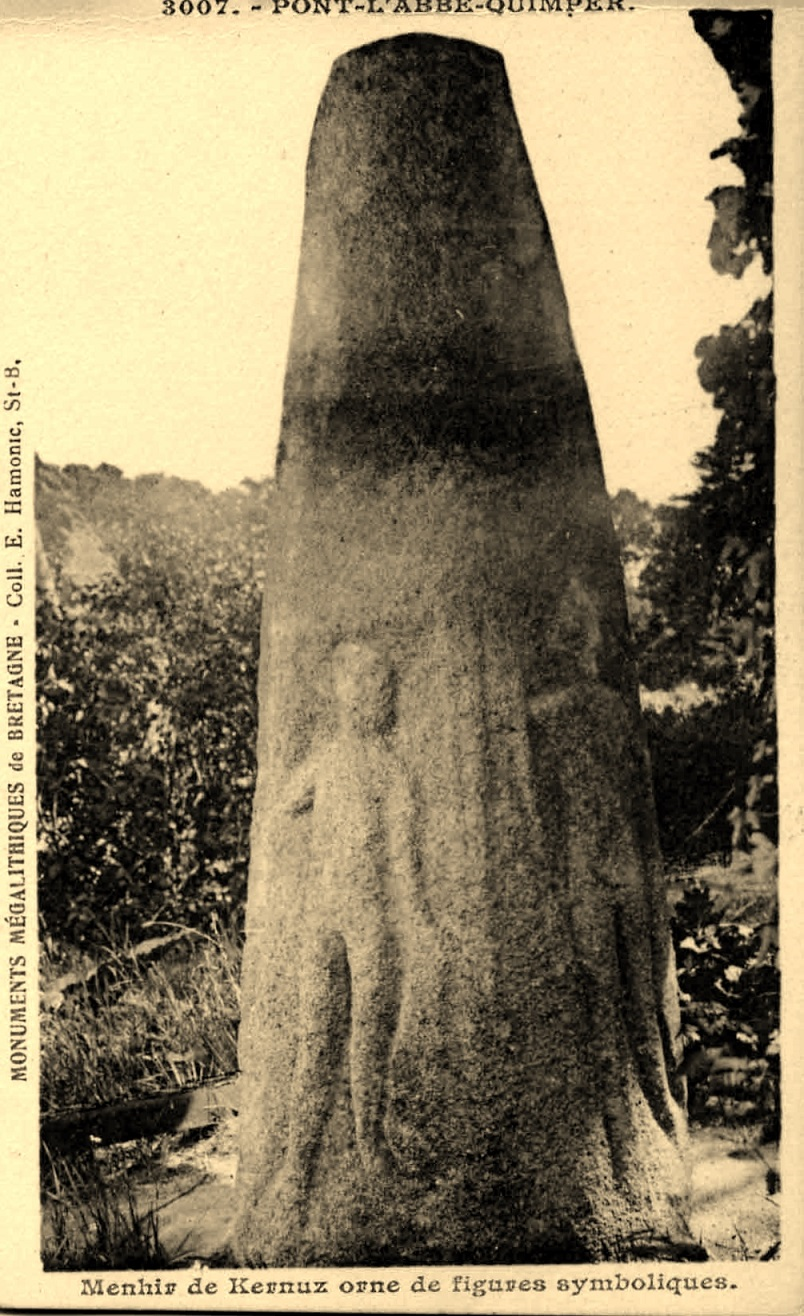 Émile Hamonic : Le menhir de Kernuz" (carte postale, vers 1910)